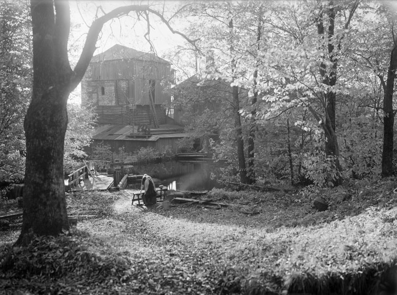 Dammen bakom mulltimmerhyttan. Bilden är tagen efter 1919. Motiv: Engelsbergs bruk Nyckelord: Byggnadsminnen, Industriminnen, Riksintressen, Världsarv Kategori: Hytta Dammen bakom mulltimmerhyttan. Bilden är tagen efter 1919.